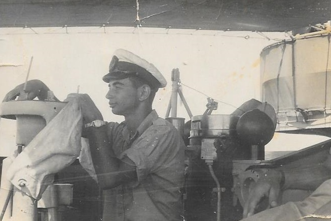 קדט גדעון רז בגשר הפריגטה אח"י מזנק (ק-32) בעת הפלגת אימון למחזור תלמידי בי"הס לקציני ים עכו